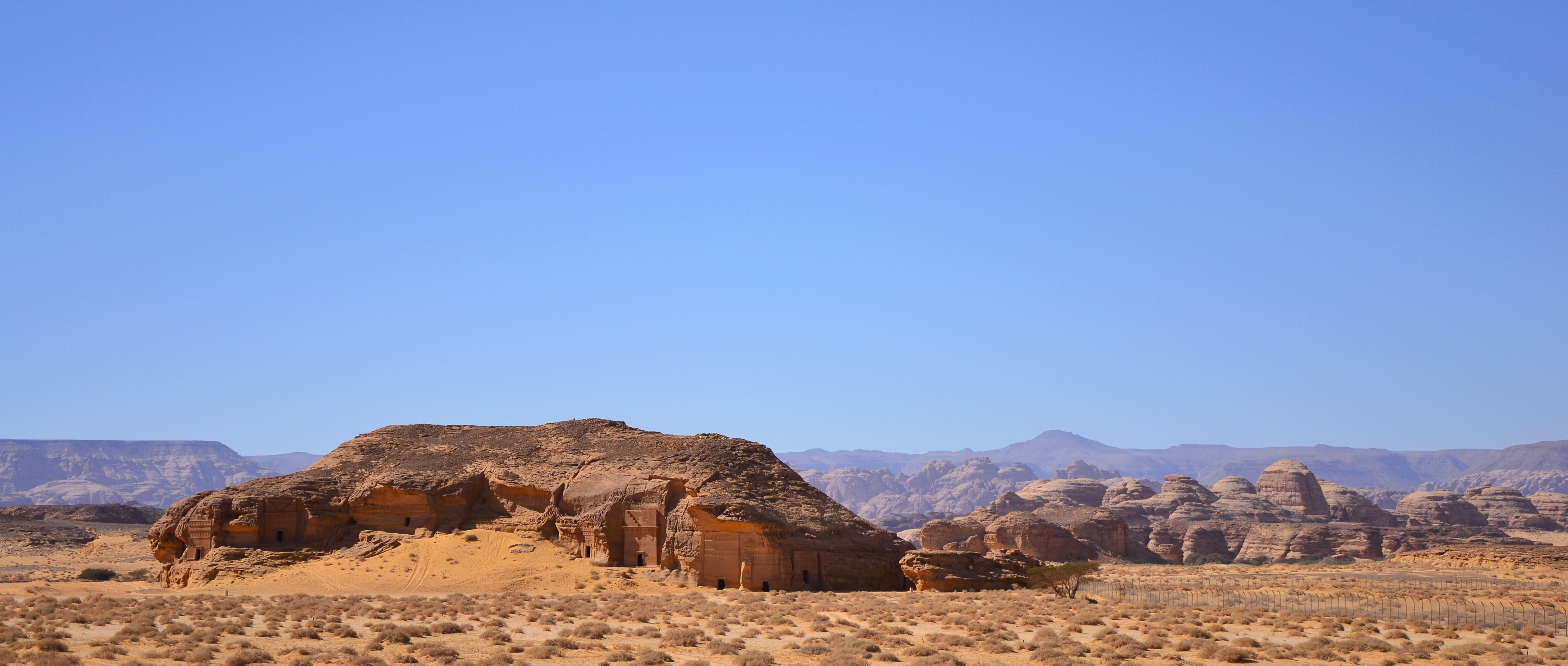 Madain Saleh